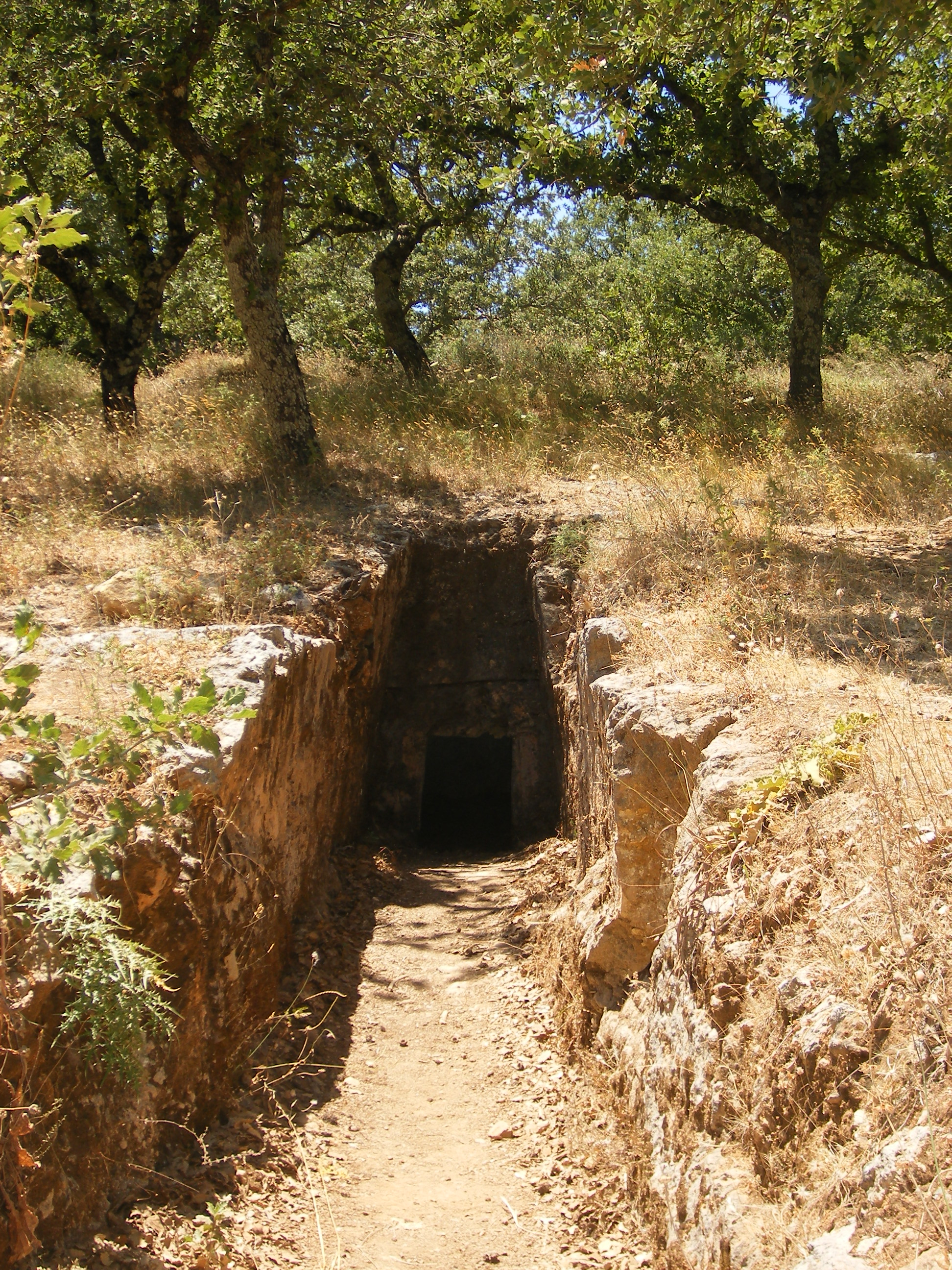 Nécropole d'Armeni (Crète)